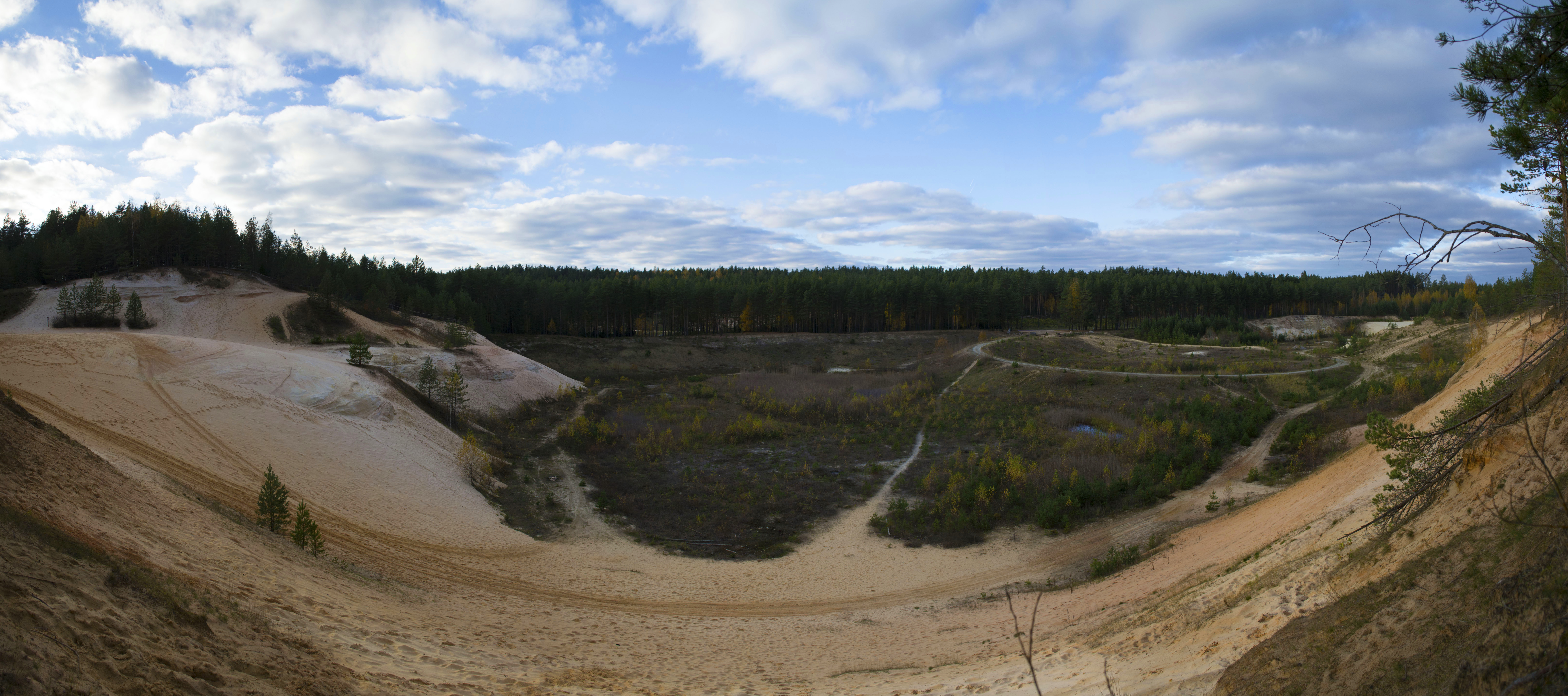 Vaate Piusa matkarajalt Piusa liivamaardlale.